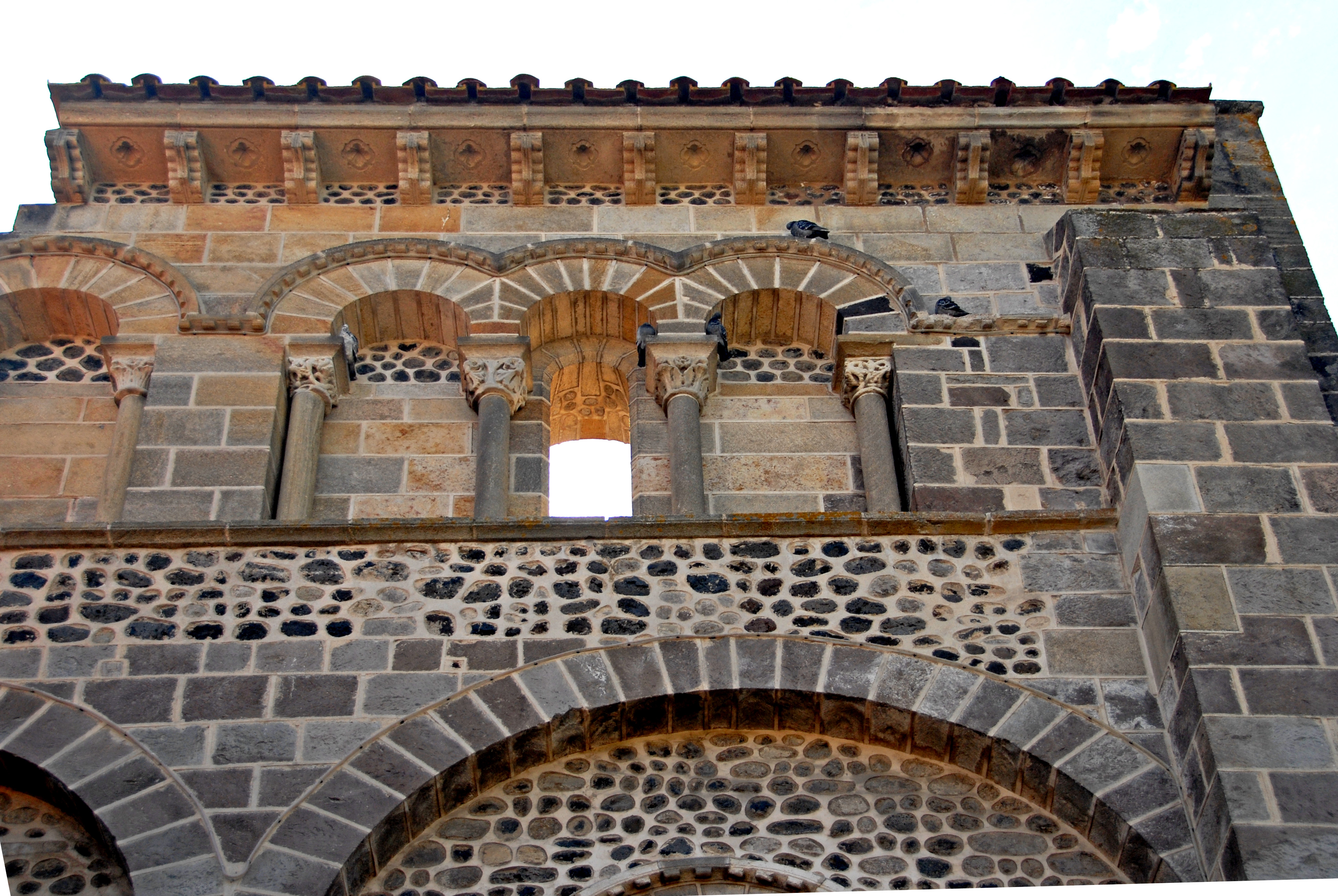 Mozat, nördl. Emporengeschoss, Detail